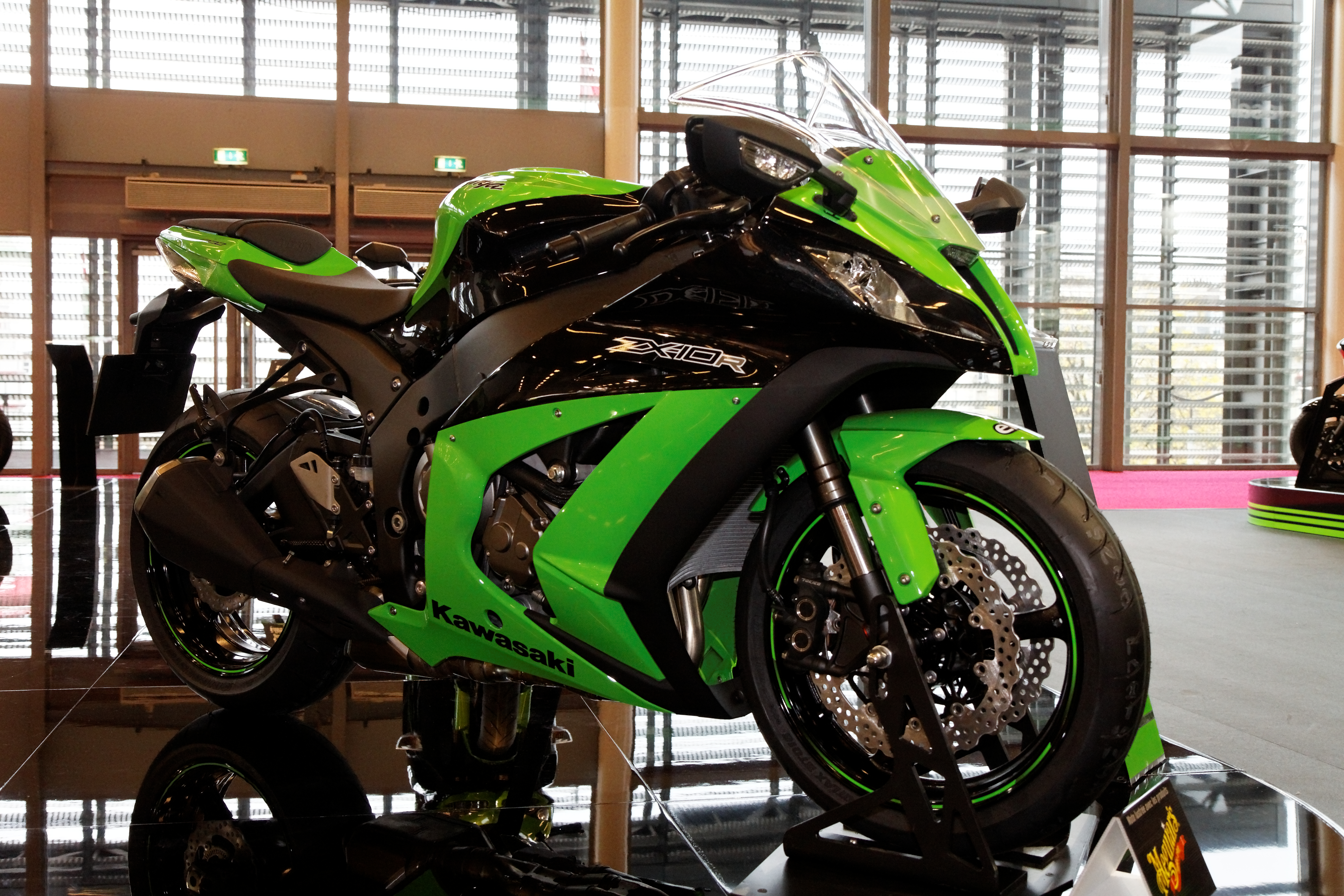 Kawasaki - Ninja ZX-10R